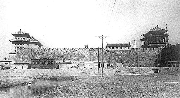 北京西直门城楼、箭楼及瓮城。